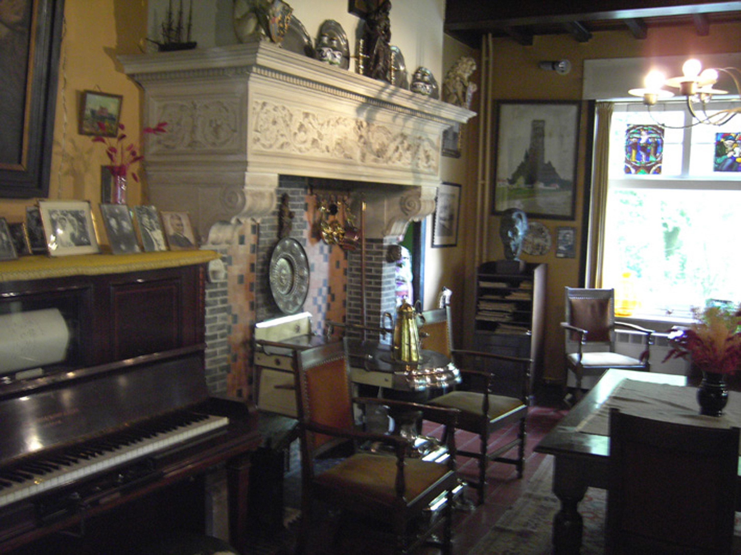 Ingooigem - Leefkamer Streuvels